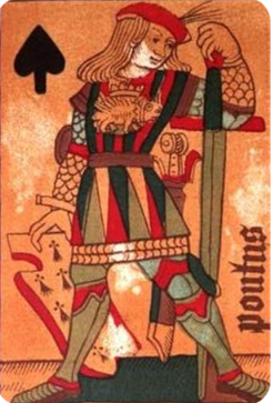 Spielkarte aus der Zeit König Ludwigs XII. von Frankreich (1462-1515). Pik, beschriftet in gotischer Schrift "pontus".